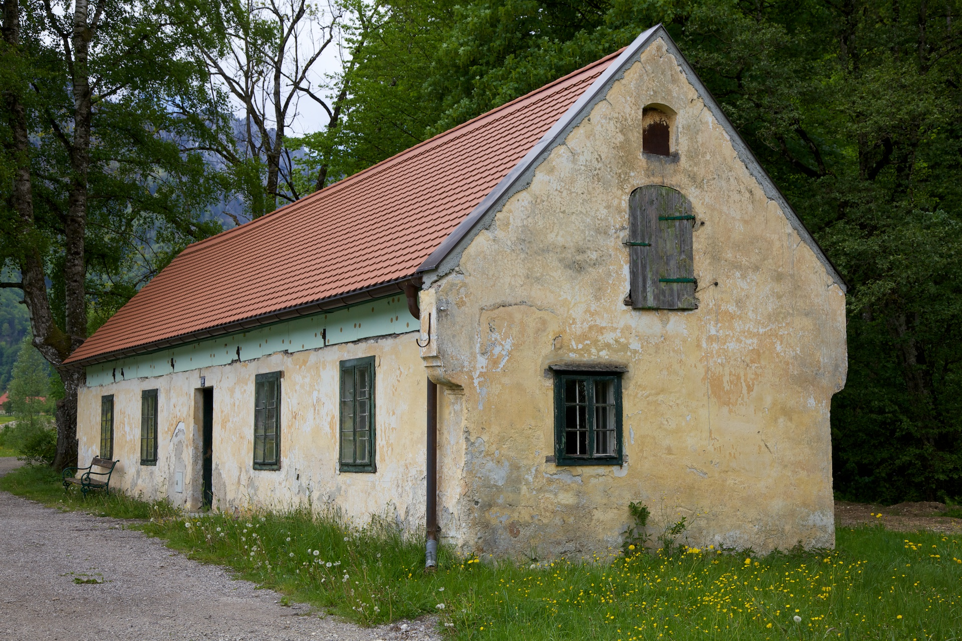 Auszugshäusl der Pfusterschmiede